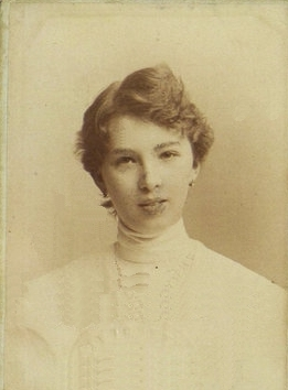 Váradi Aranka magyar színésznő